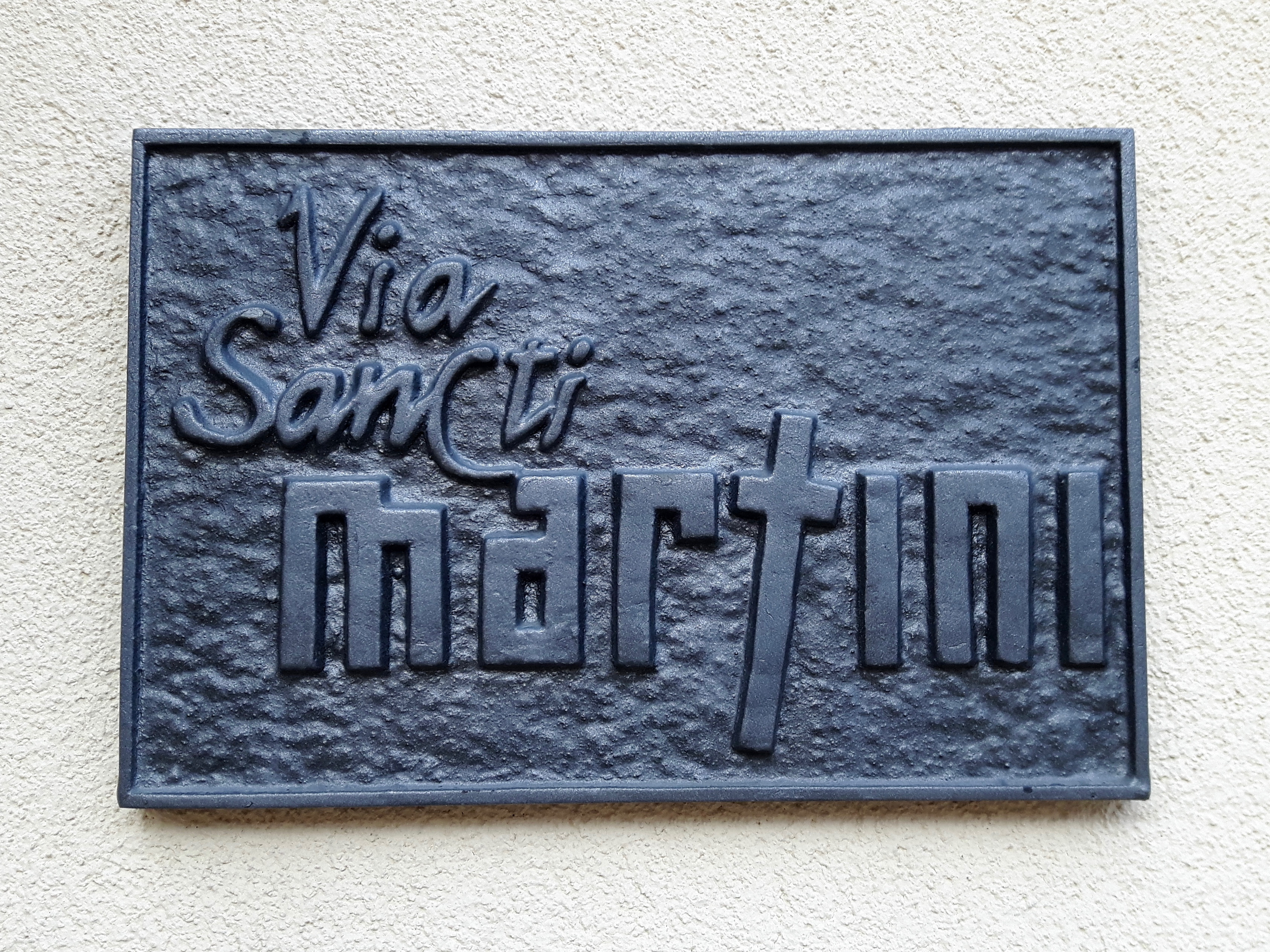 Tafel Via Sancti Martini an der Frontfassade der Pfarrkirche St. Martin in Wien-Siebenhirten.